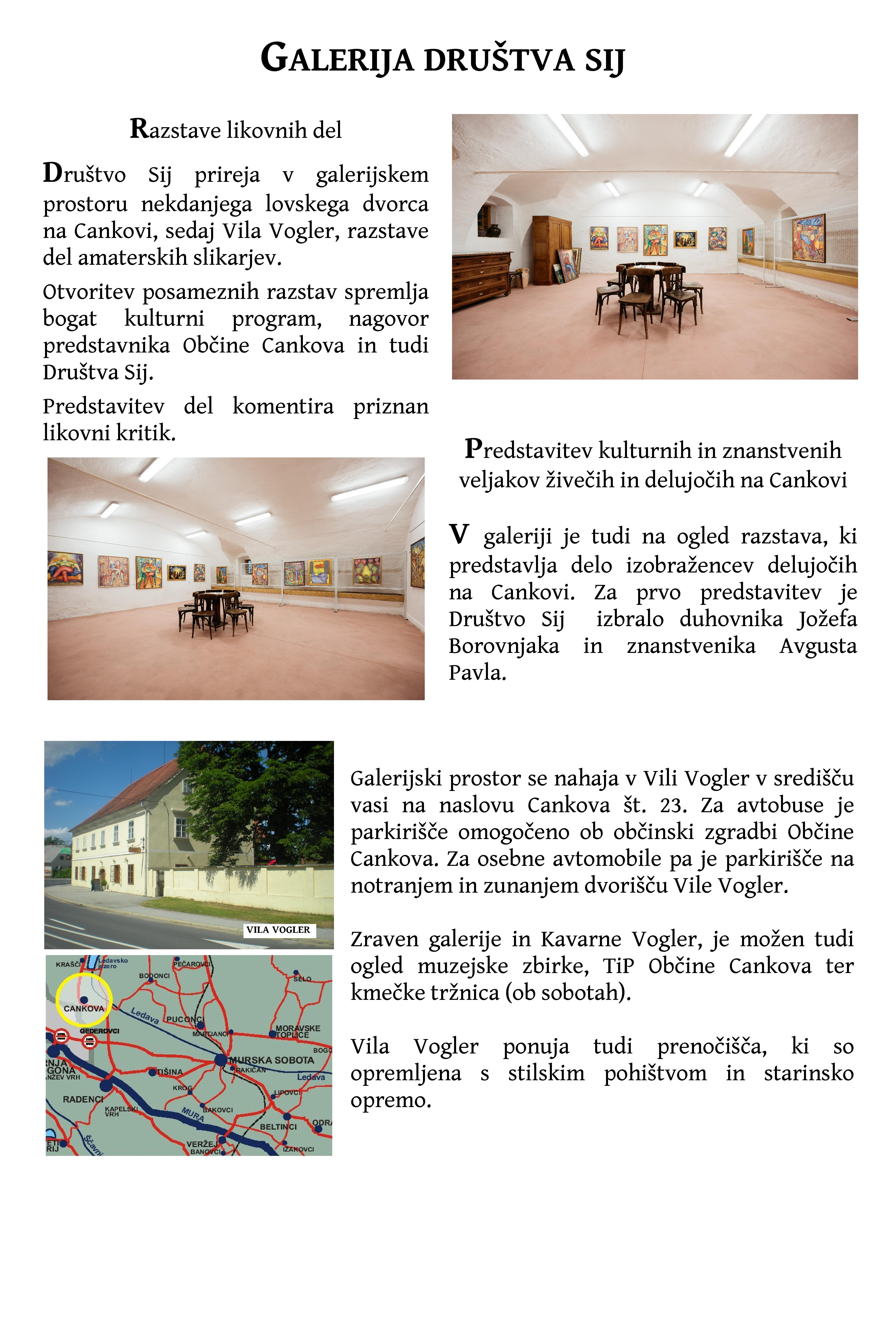 Predstavitev galerije v objektu Vogler